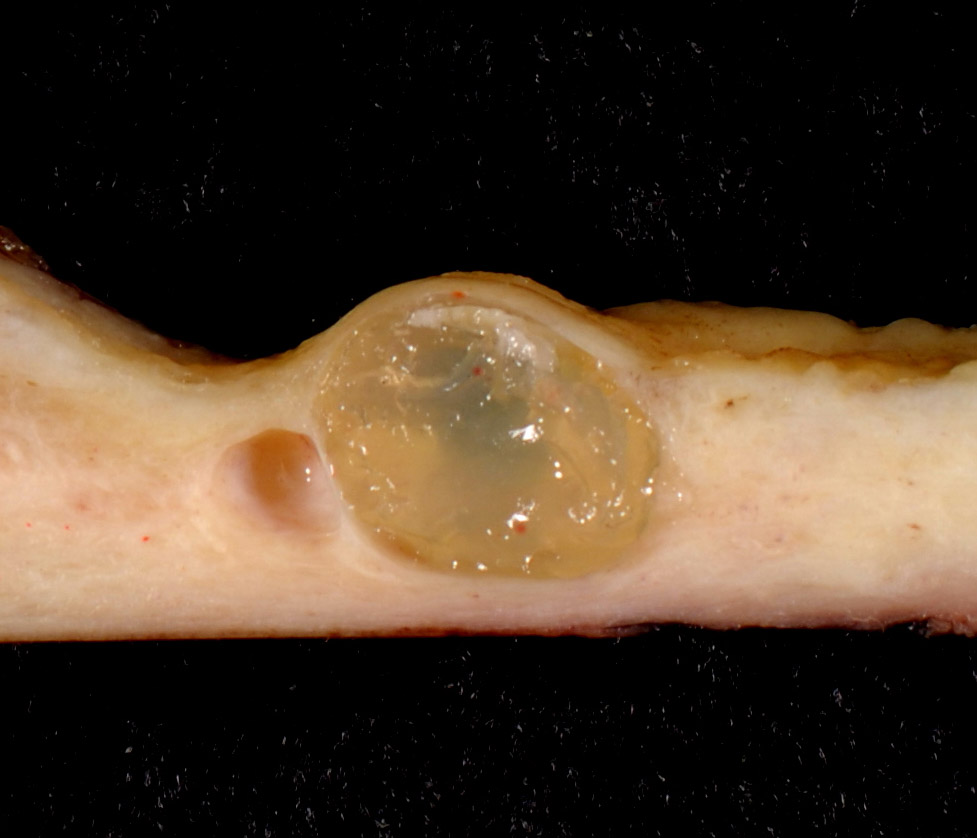 Ovula nabothi in einem Präparat der Uterus-Wand